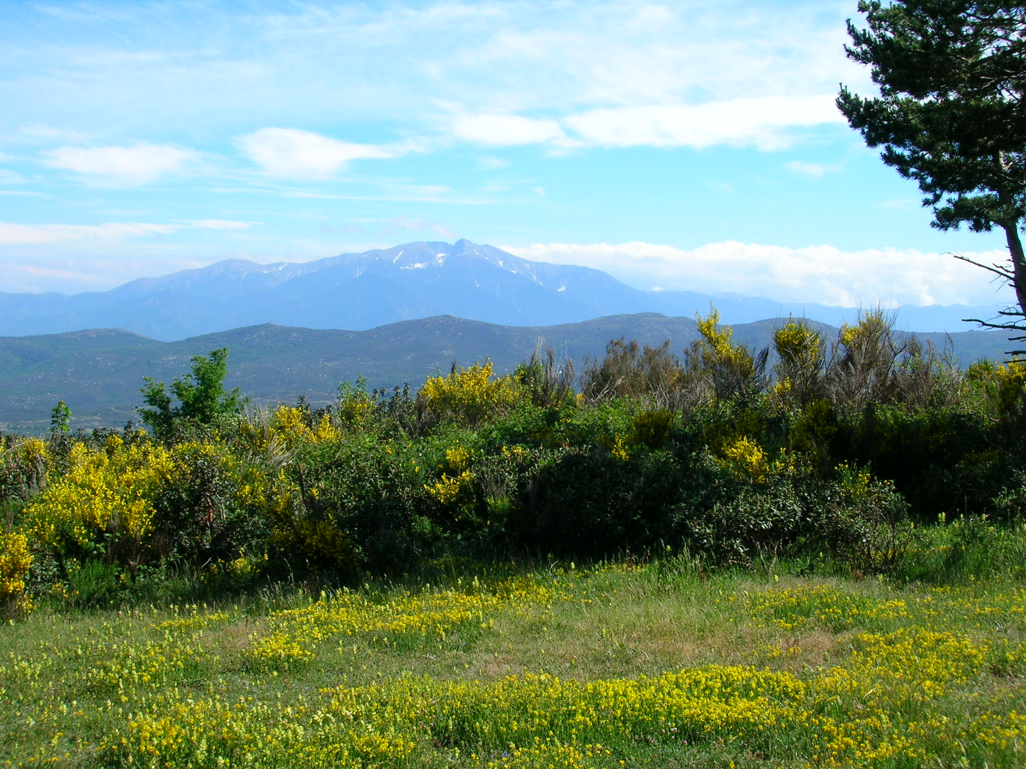 Cliché du pic du Canigou vu dans les environs de Prats-de-Sournia (Pyrénées-Orientales, France) le 30 mai 2006 par Emmanuel Dubois